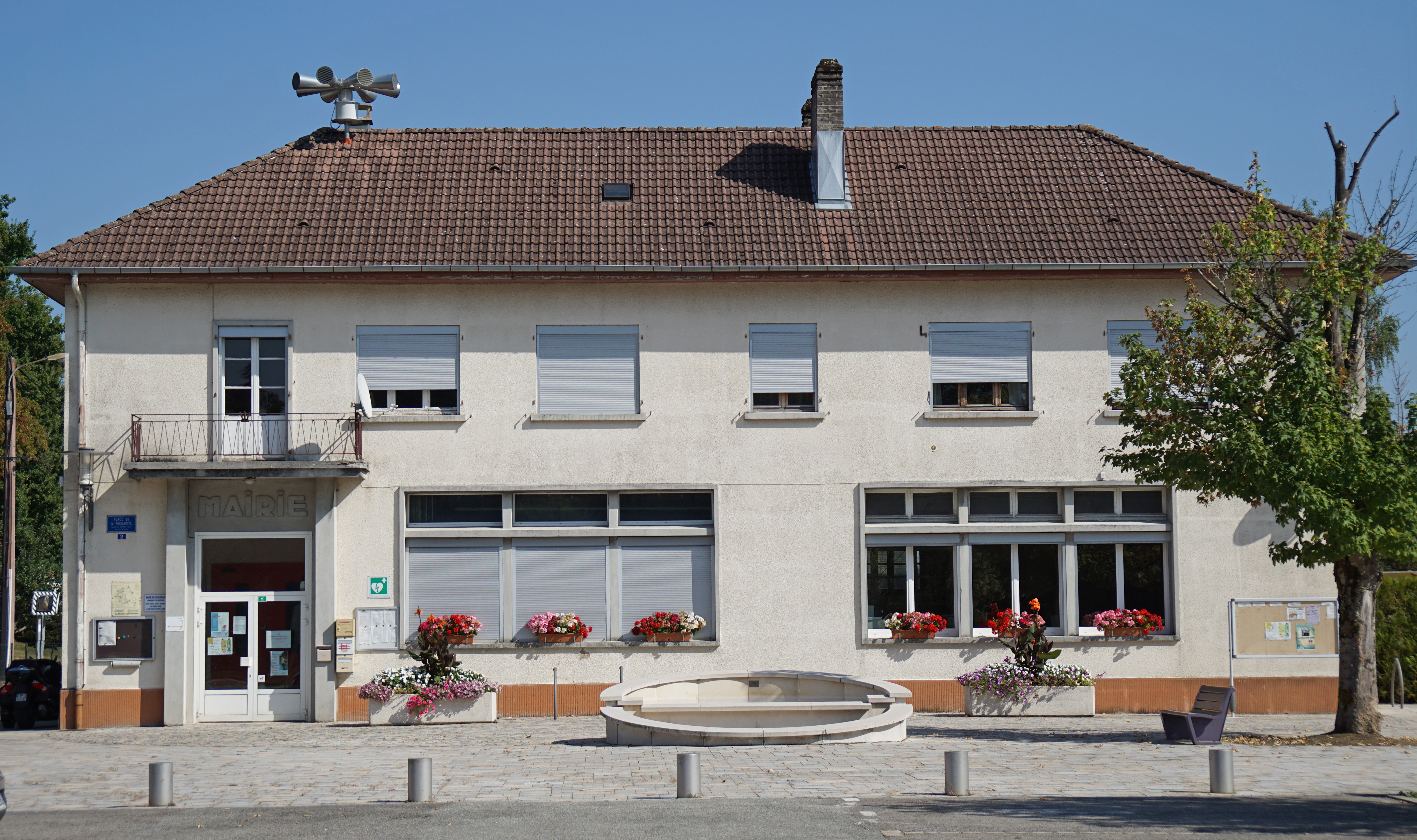 La mairie de Couthenans.